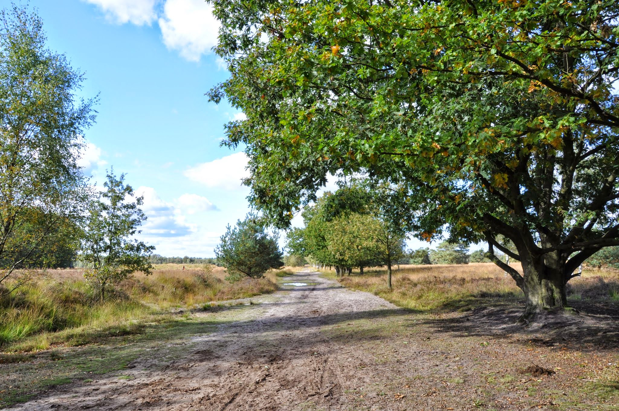 herfstgenot